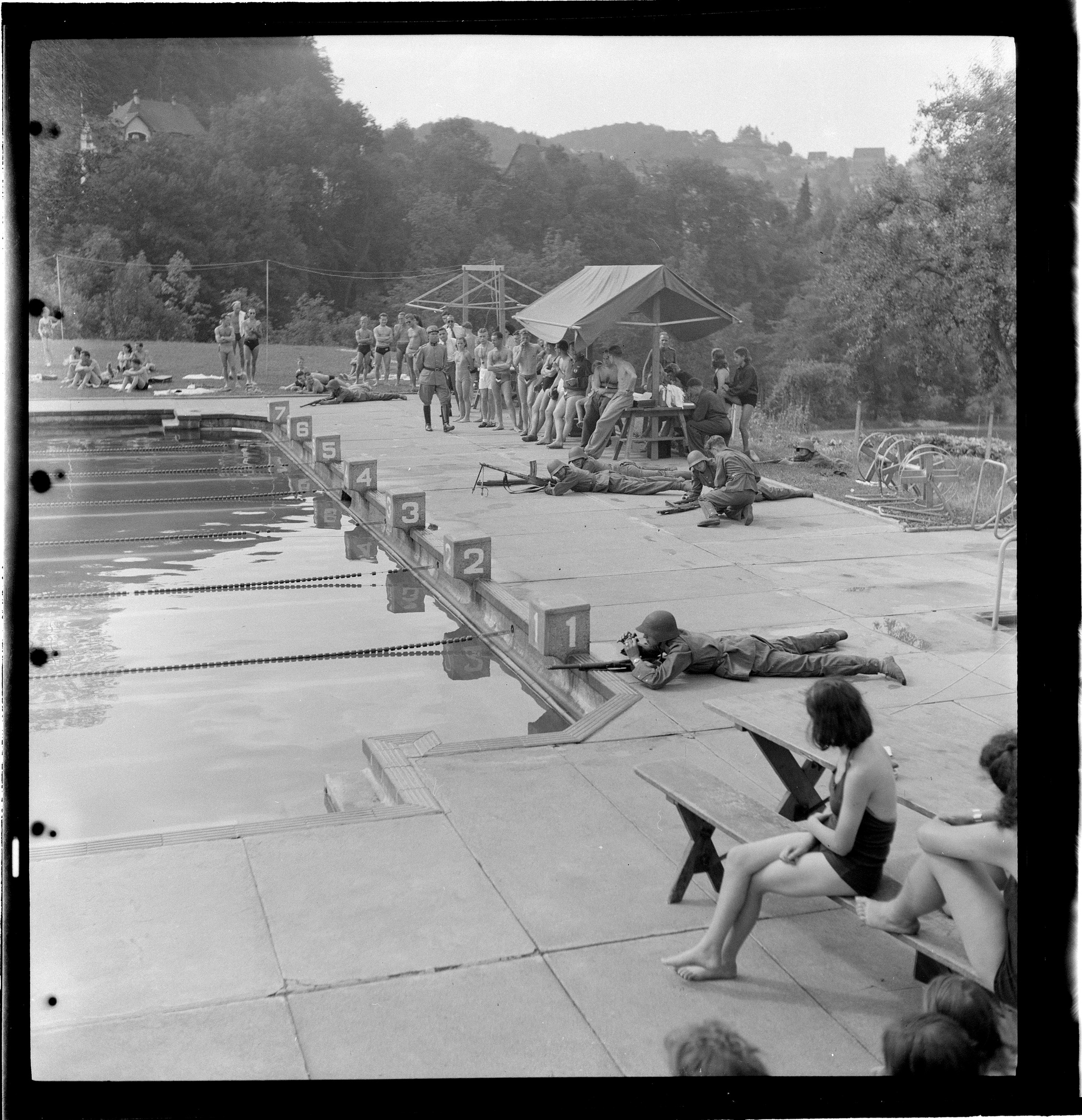 Wehrsportliche Demonstrationen im Terrassenschwimmbad Baden, Soldaten schwimmen und springen in voller Ausrüstung, Auftrag Badener Tagblatt (1944-1945)